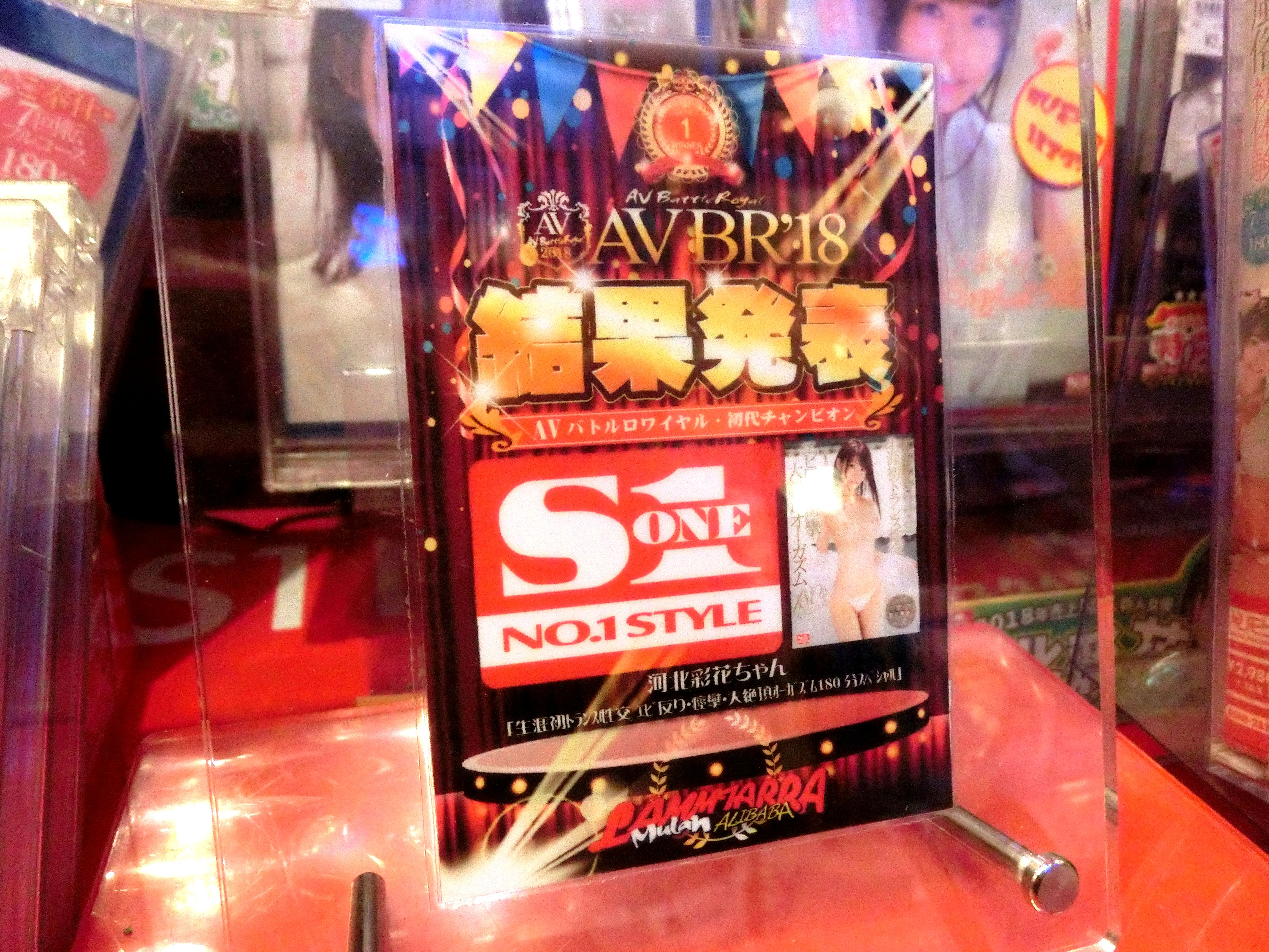 AVBR18 GP 優勝盾